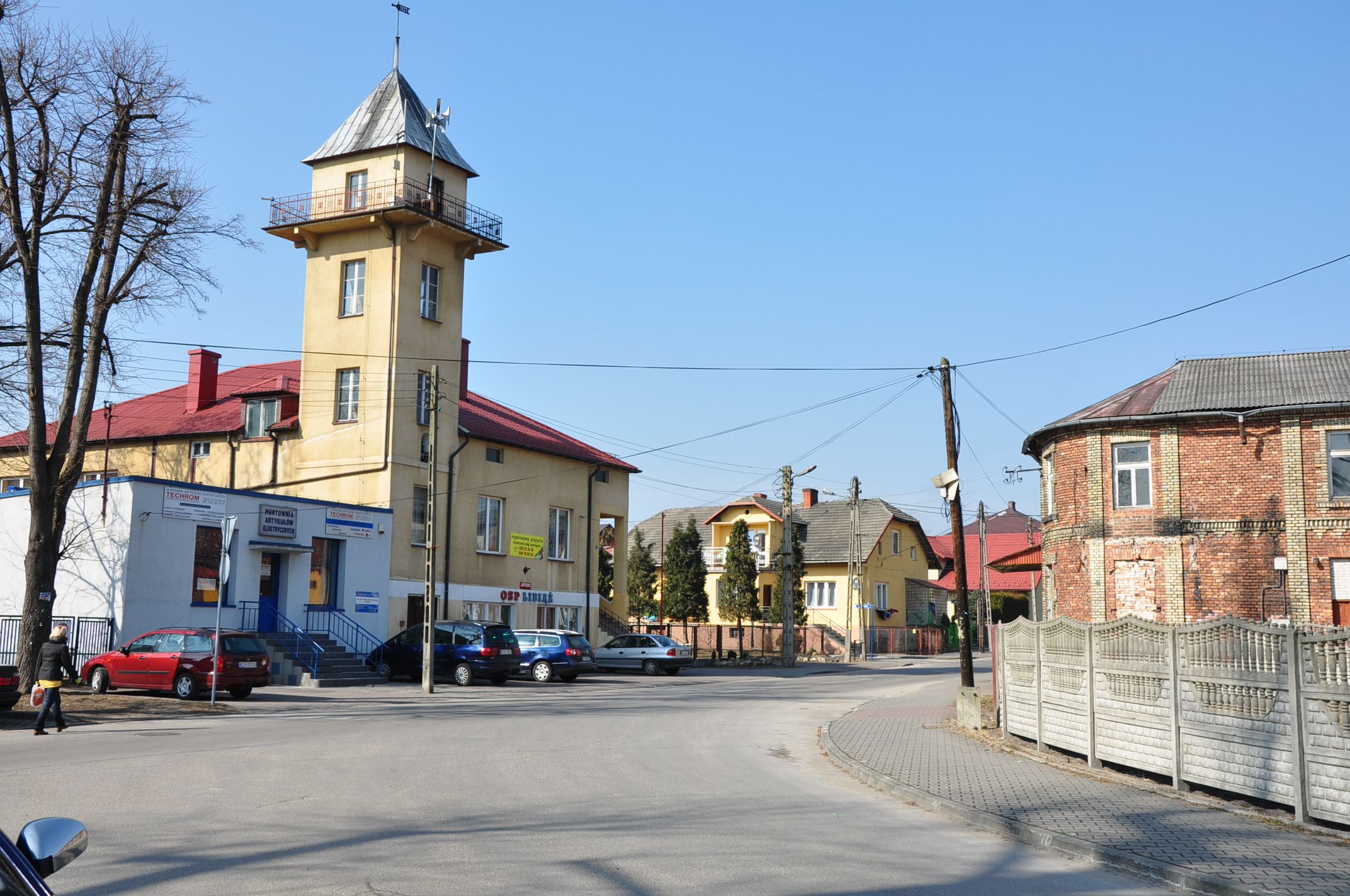 Ochotnicza Straż Pożarna w Libiążu.